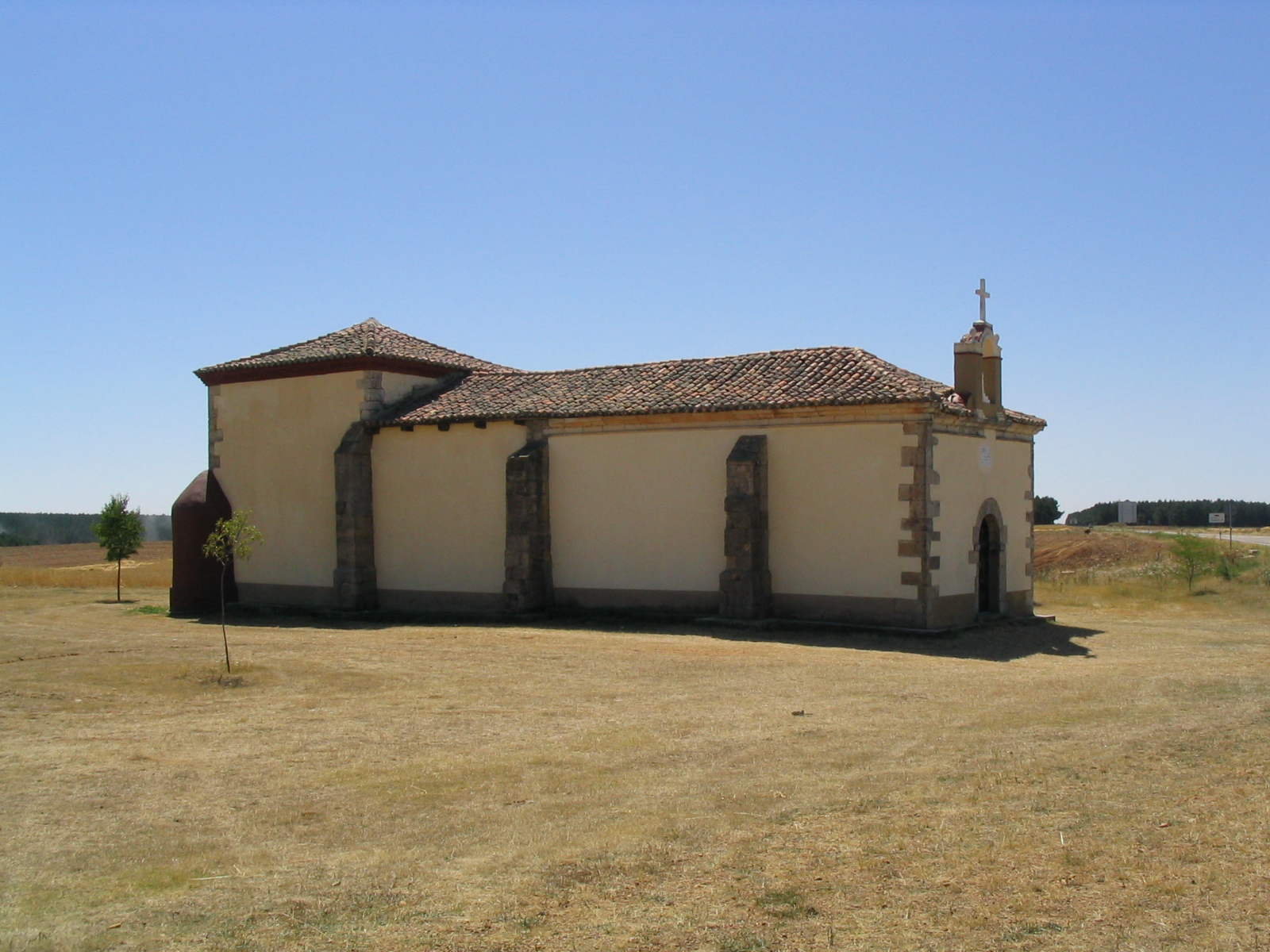 Ermita de la Virgen del Nido en Pino del Río (Palencia, Castilla y León).